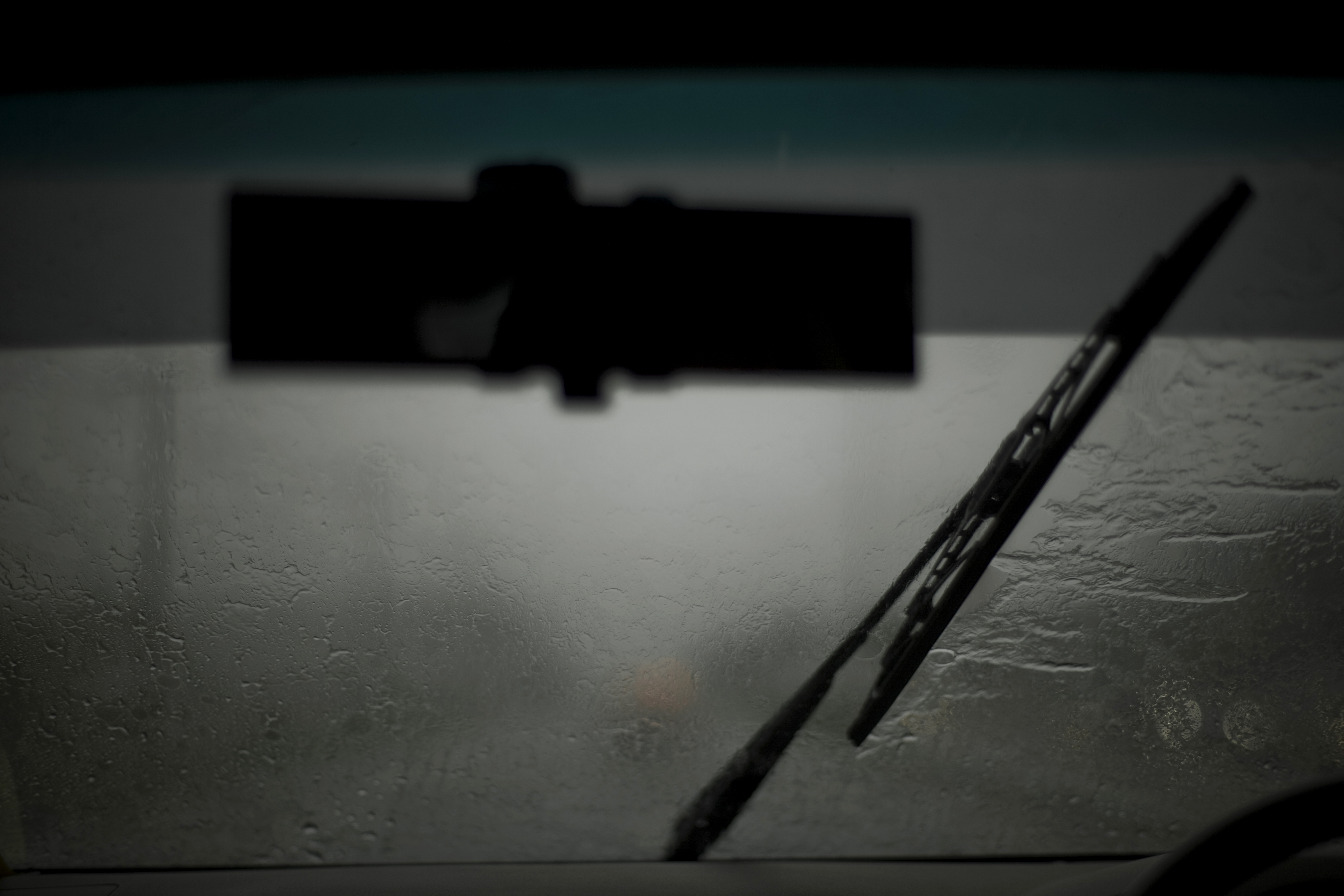 นายกรัฐมนตรี ตรวจเยี่ยมจุดดินถล่ม ณ หมู่ที่ 7 ตำบลหน้าเขา อำเภอเขาพนม จังหวัดกระบี่ วันพฤหัสบดี ที่ 31 มีนาคม พ.ศ.2554 (Photographer attached to the Prime Minister of the Kingdom of Thailand (H.E.Mr.Abhisit Vejjajiva) : Peerapat Wimolrungkarat / พีรพัฒน์ วิมลรังครัตน์) @is50mm